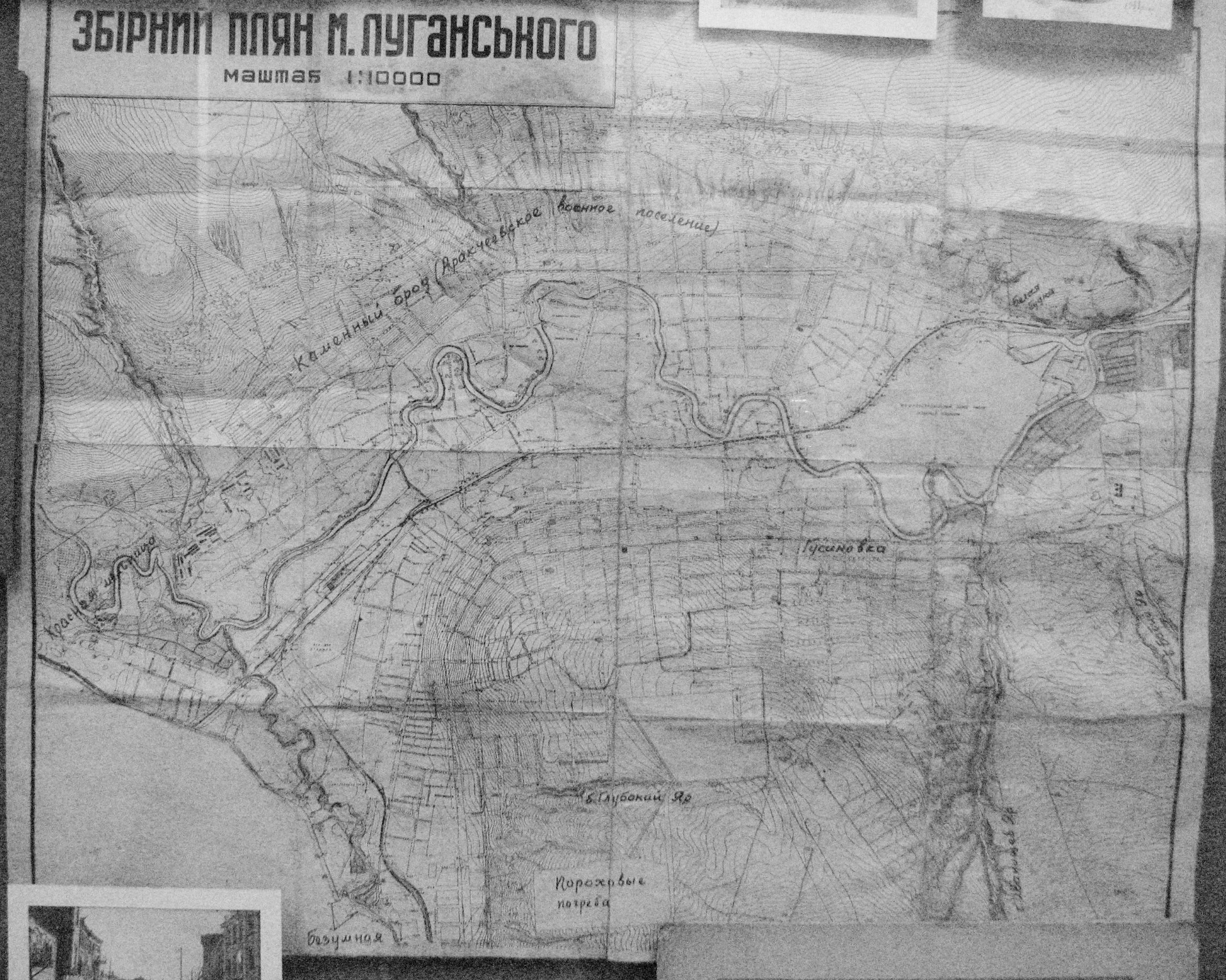 Збірний плян м. Луганського. маштаб 1:10000 З залів луганського краєзнавчого музею.